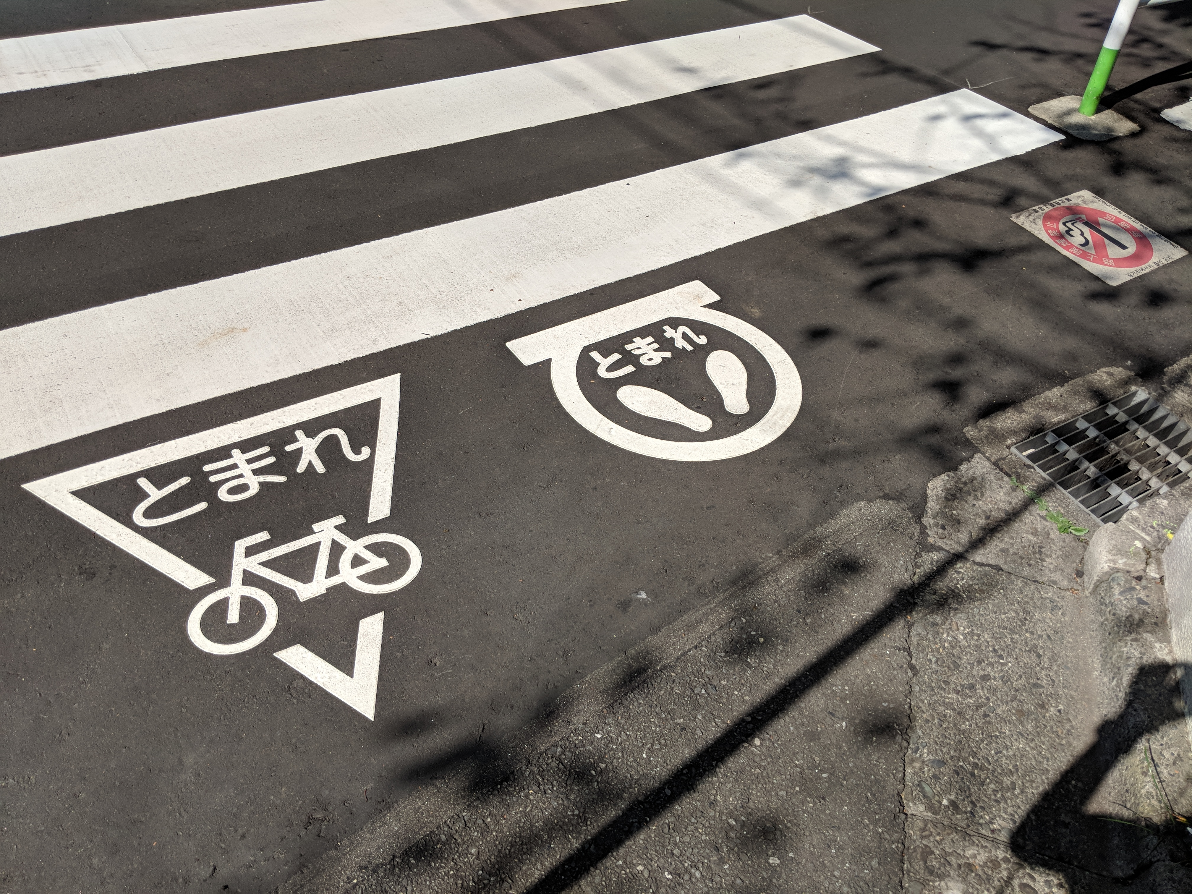 Japan Trip 2018 2055